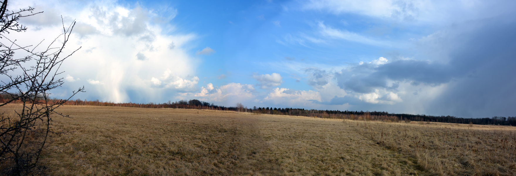 Північне Поділля, Бродівський, Буський, Золочівський р-ни